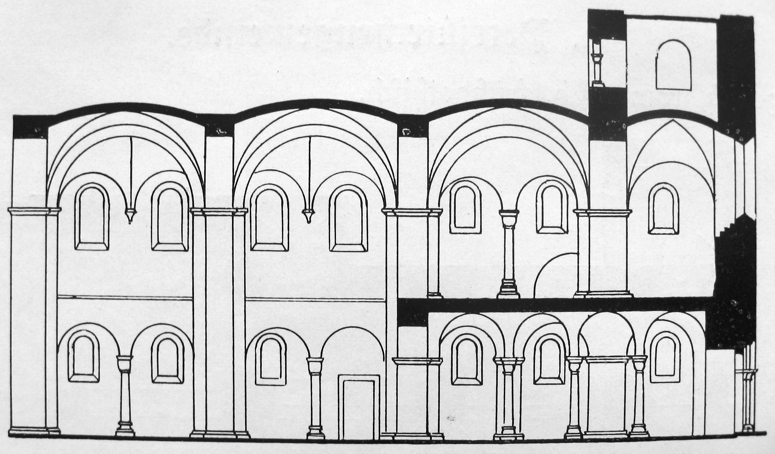 Soest, Petrikirche, Längsschnitt Ludorff 1905